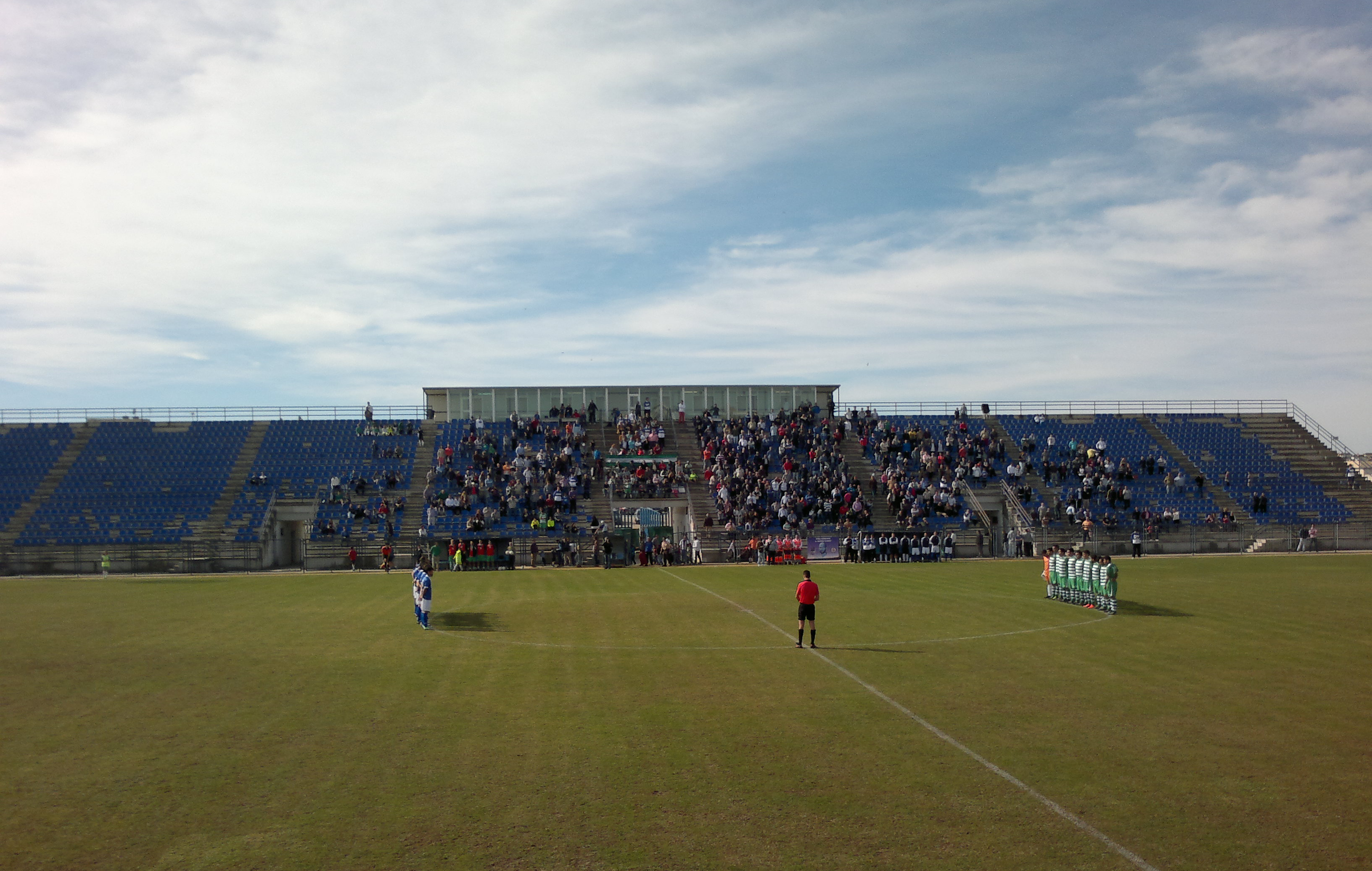 Federico Mayo CF B - Xerez Deportivo FC encuentro correspondiente a la temporada 2013/14